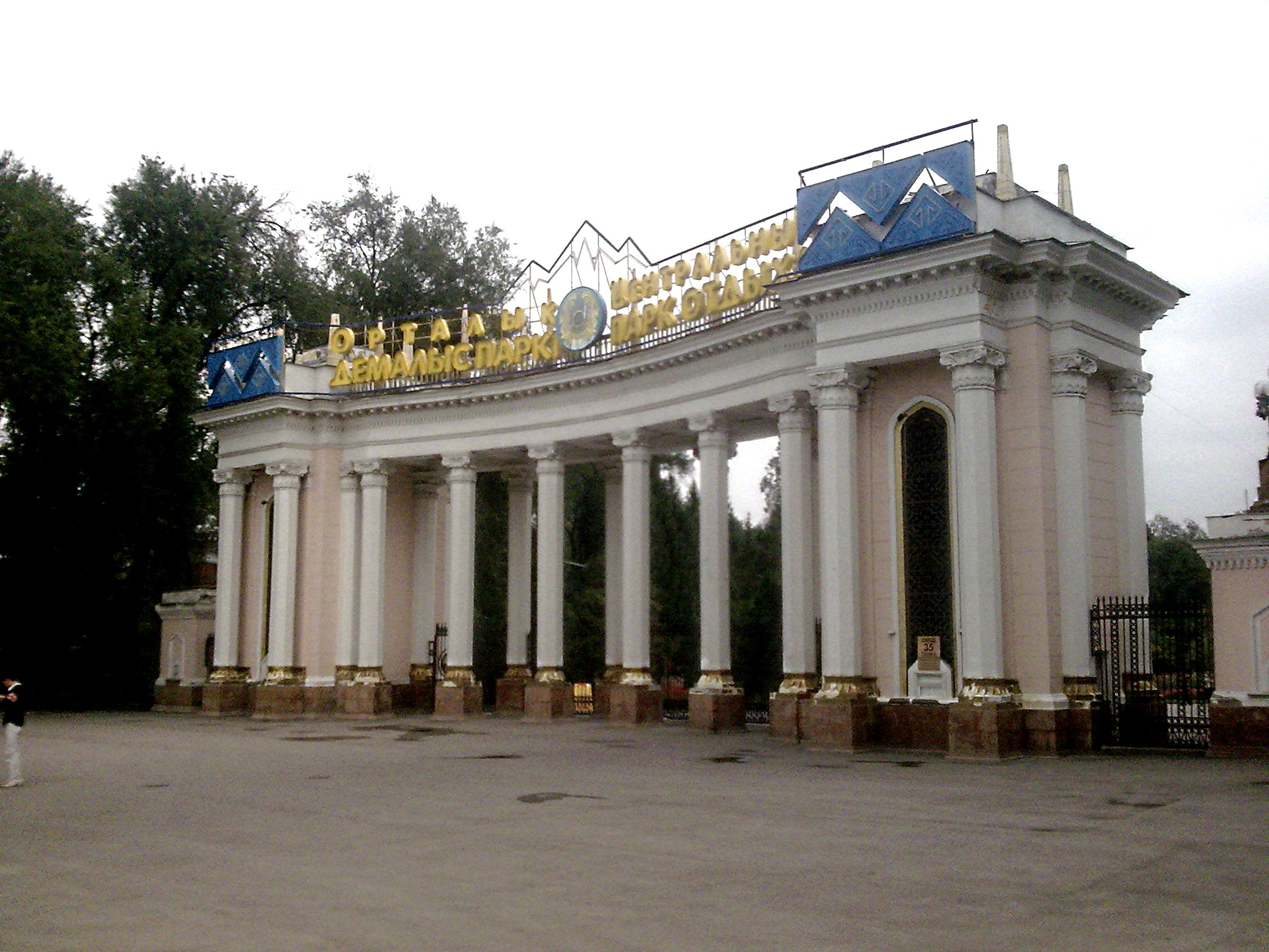 Главный вход в Центральный Парк Алматы.